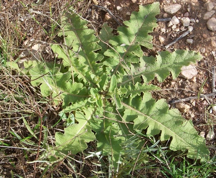 Verbascum sinuatum (Acigutre, tientayernos) : Hojas, roseta basal con escapes florales incipientes - Cabezo de los Ojales, Albatera (Alicante, España).